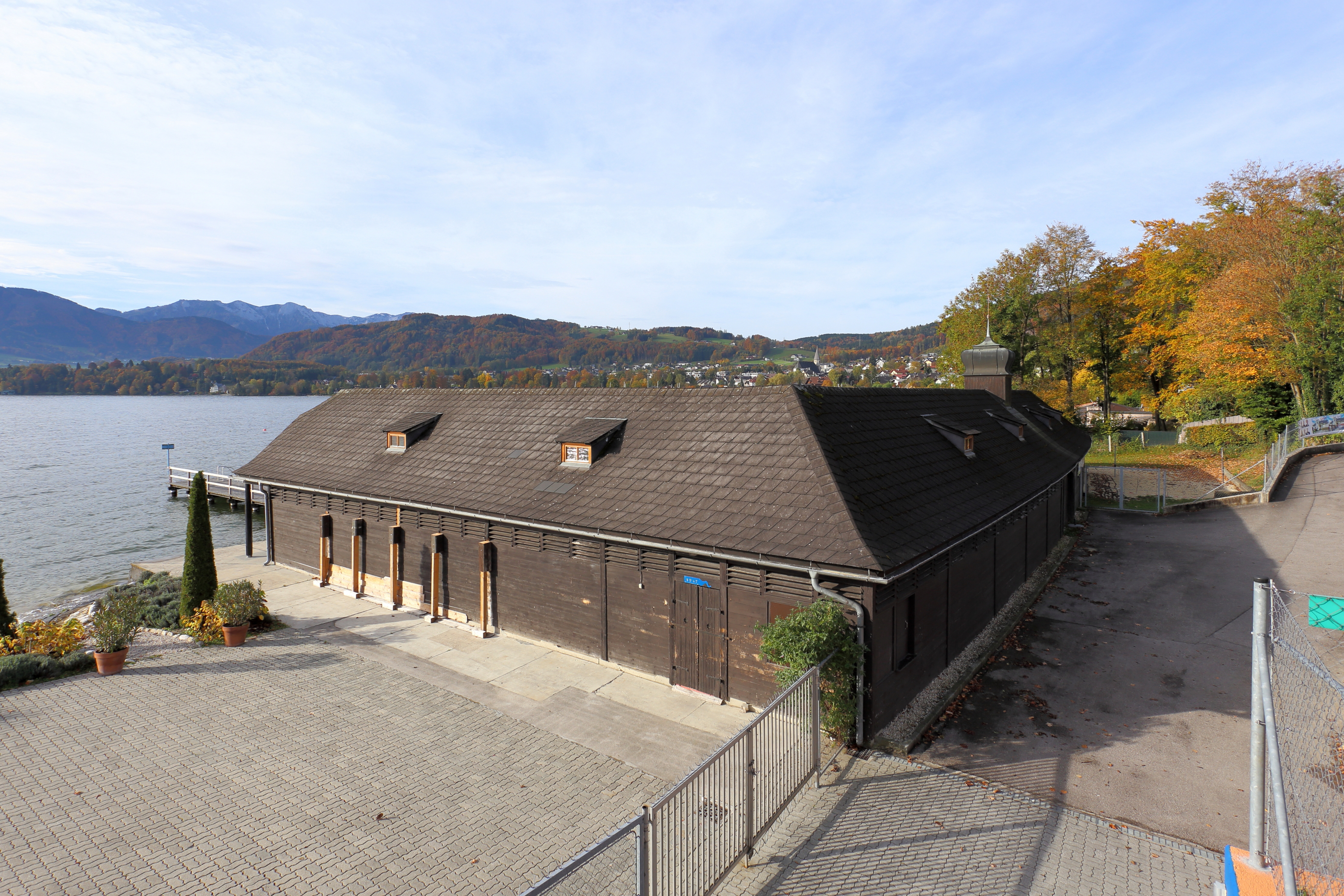 Das Seebad der oberösterreichischen Marktgemeinde Altmünster. Die Badeanlage wurde 1946/47 vom Architekten Johannes Spalt im Auftrag der Gemeinde errichtet.